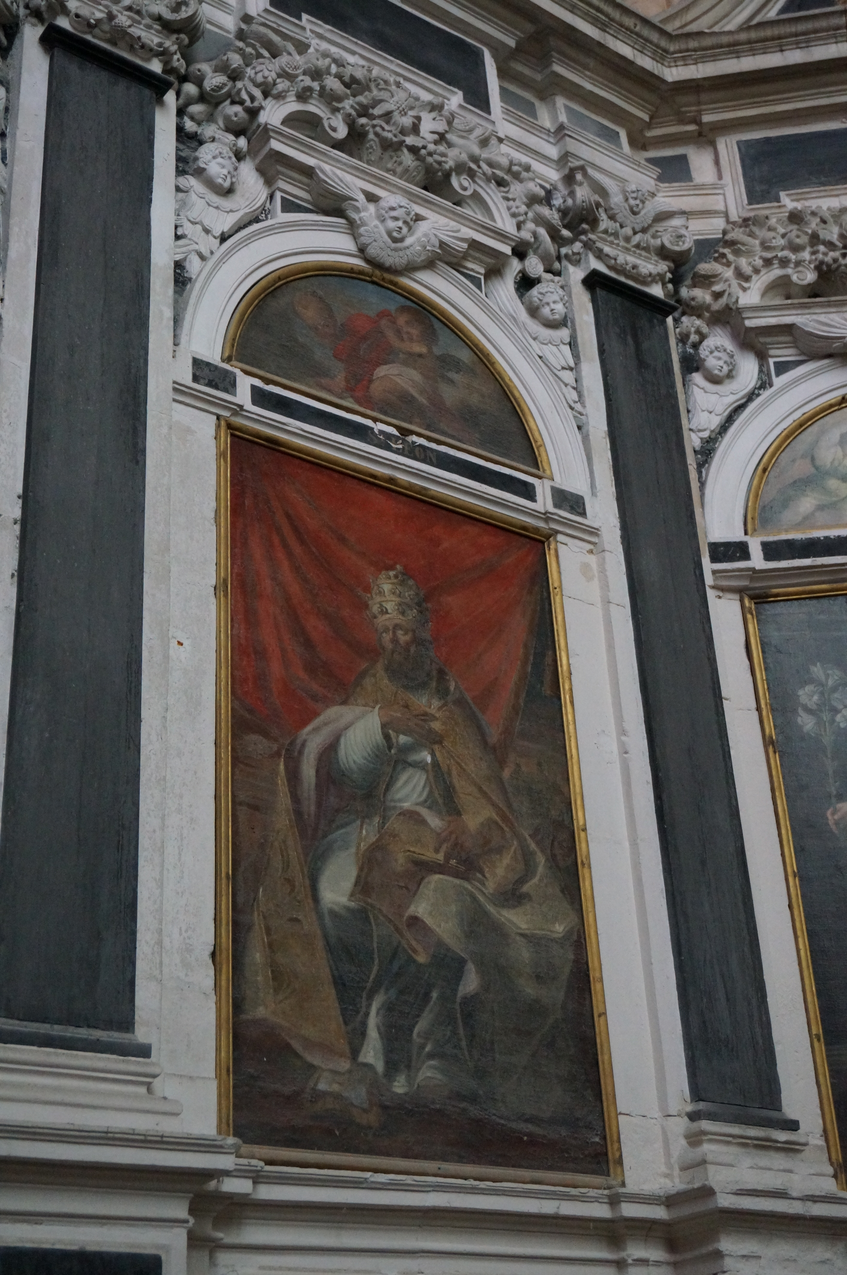 Toul (Meurthe-et-Moselle, France), cathédrale St Étienne, Saint Léon IX, évêque de Toul et pape par Claude CHARLES, 1724.